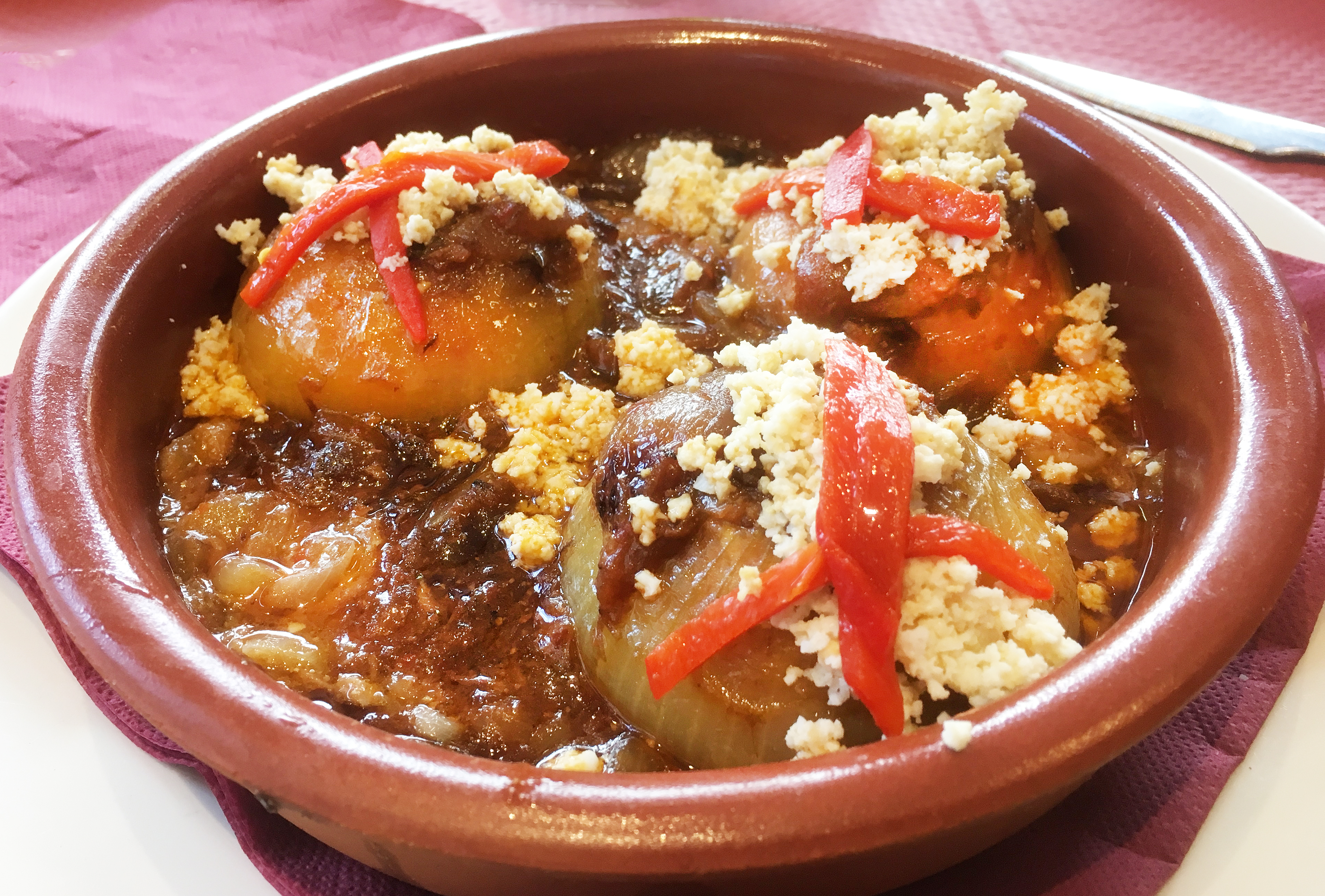 Cebollas rellenas, cebolles rellenes de bonito